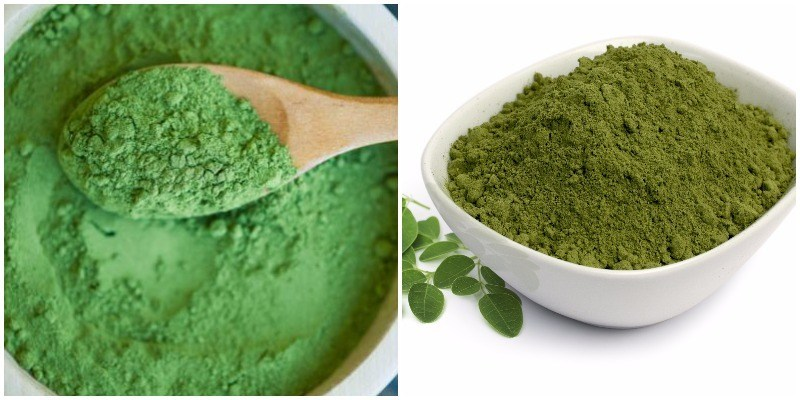 Procesando la hoja de moringa se puede extraer un polvo que tiene elevadas propiedades nutricionales.